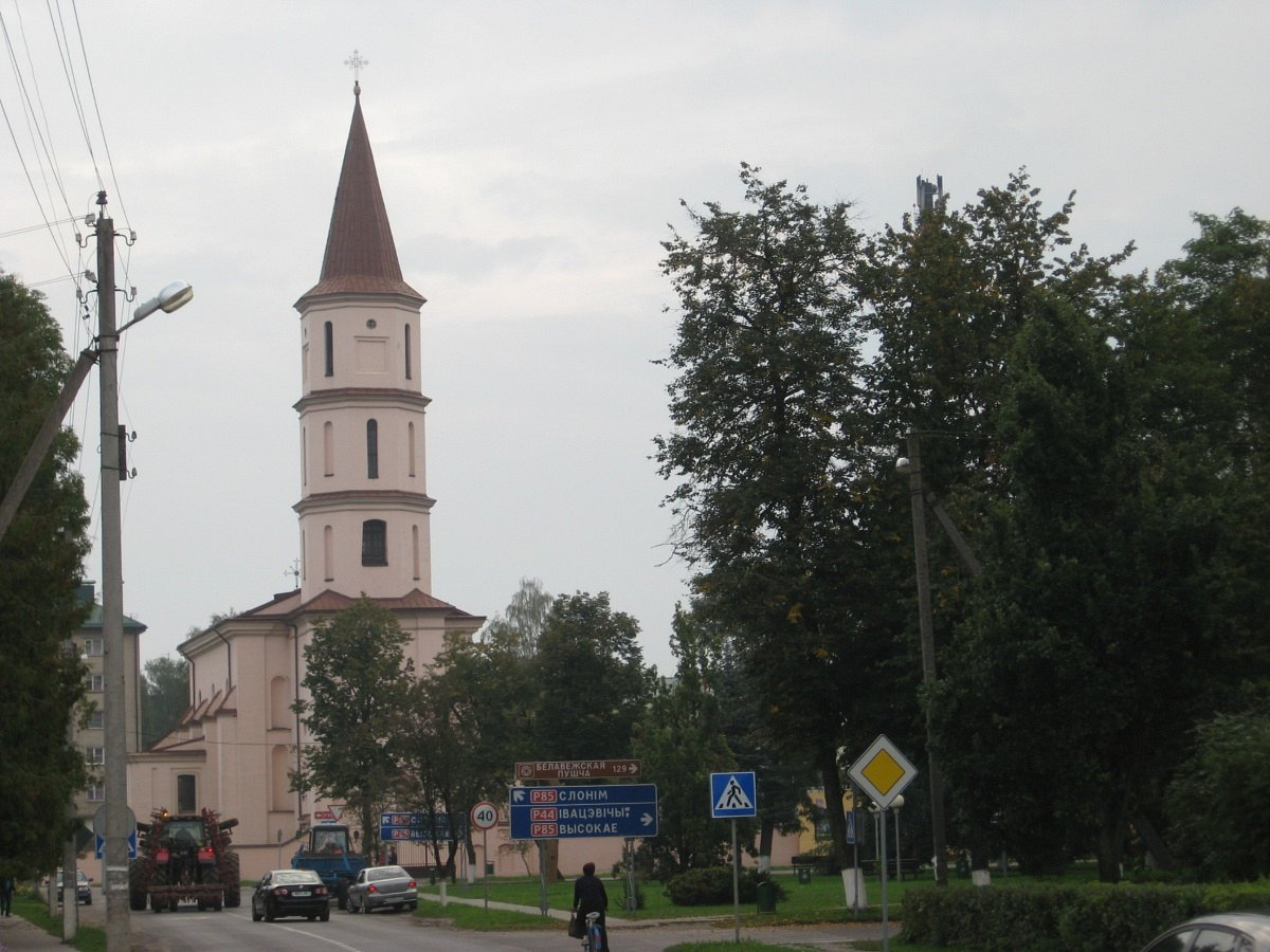 Ружанскі касцёл